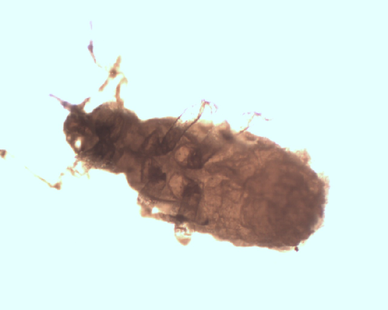 P.s. sexuapara in frühem häutungsstadium unter dem lichmikroskop (10fache Vergrößerung)